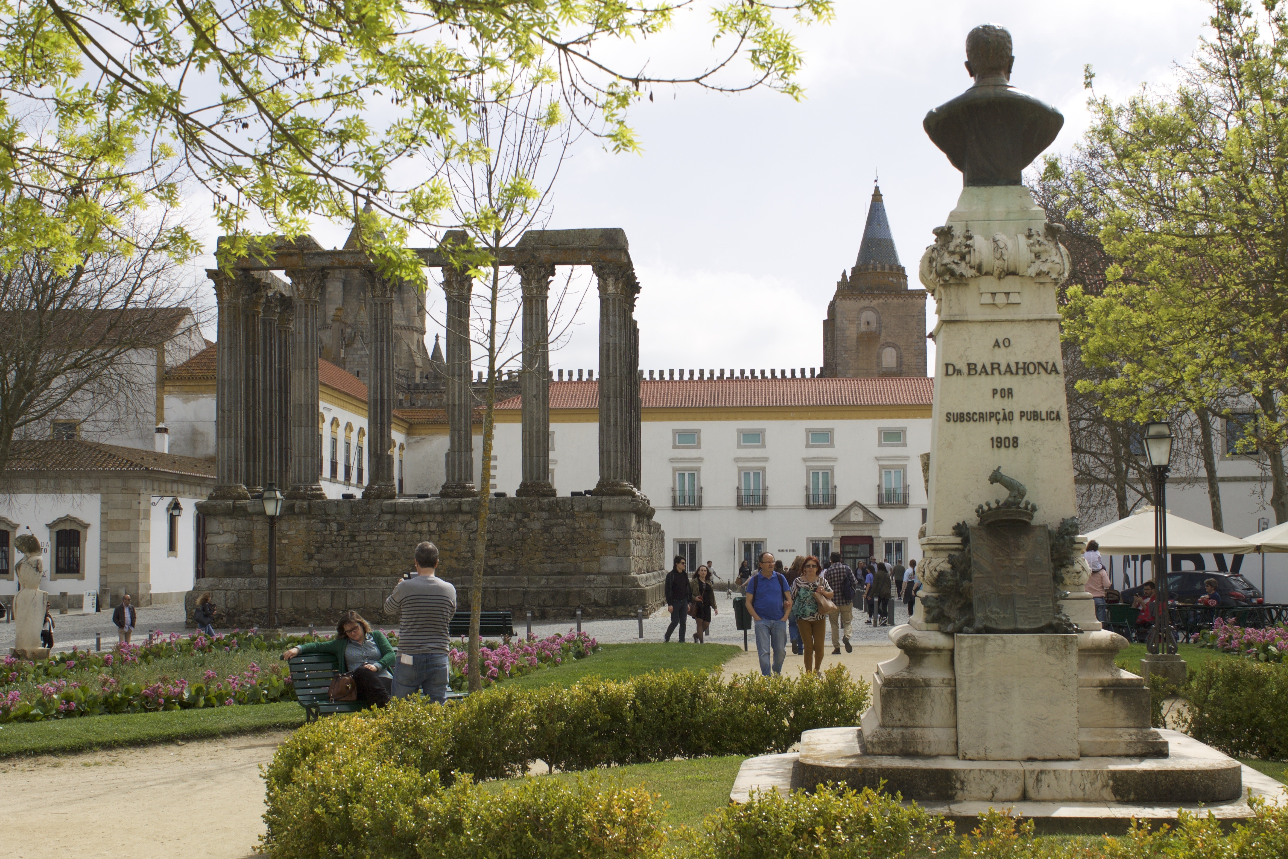 Evora